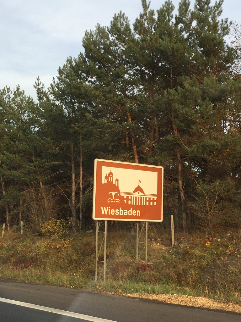 Unterrichtungstafel an der A 643 "Wiesbaden"